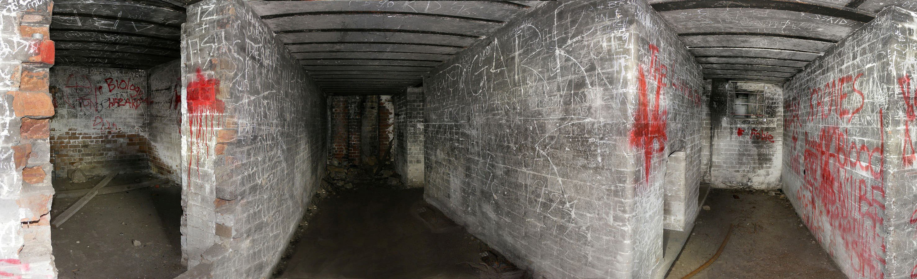 Henry fort Sydney